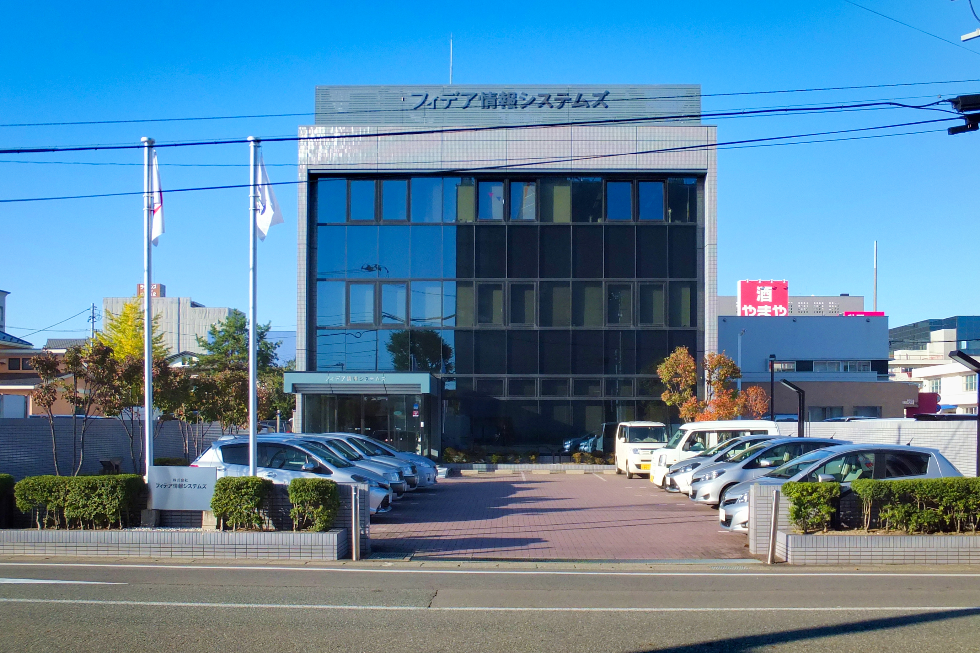 フィデア情報システムズ（秋田市山王）